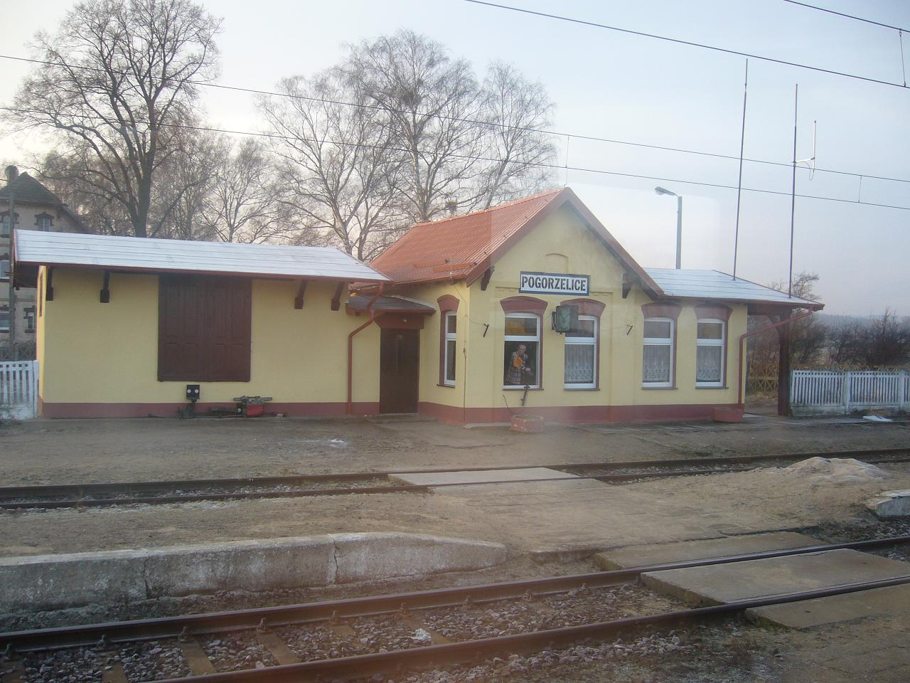 Dworzec w Pogorzelicach